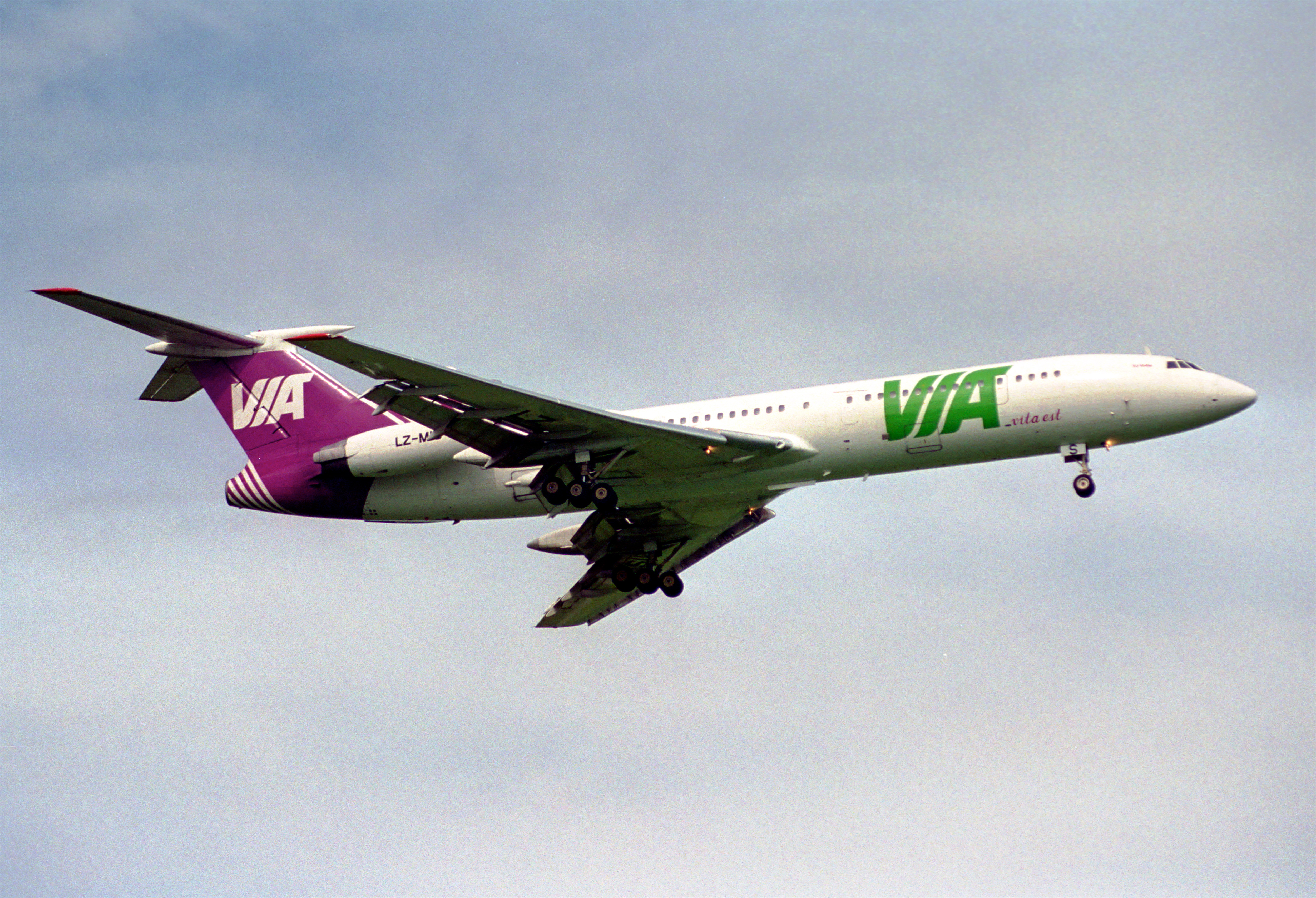 Air Via Tupolev 154; LZ-MIS@ZRH;11.05.1997